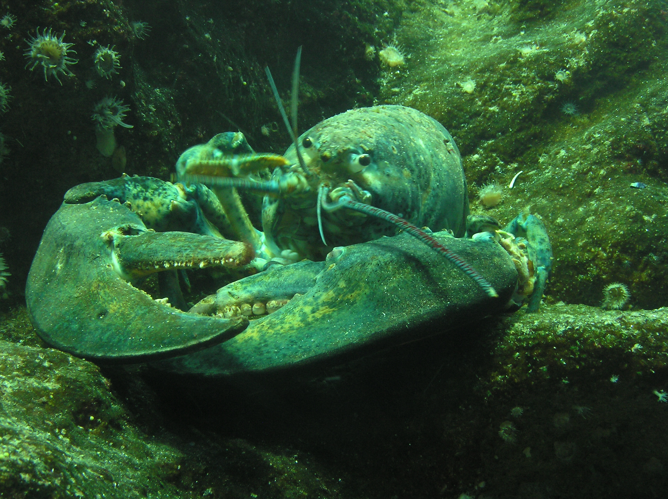 Europäischer Hummer (Homarus gammarus) (siehe Bestimmungsdiskussion)